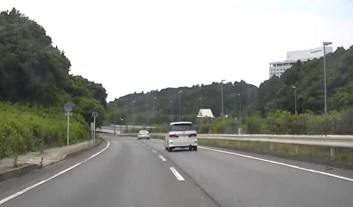 国道295号